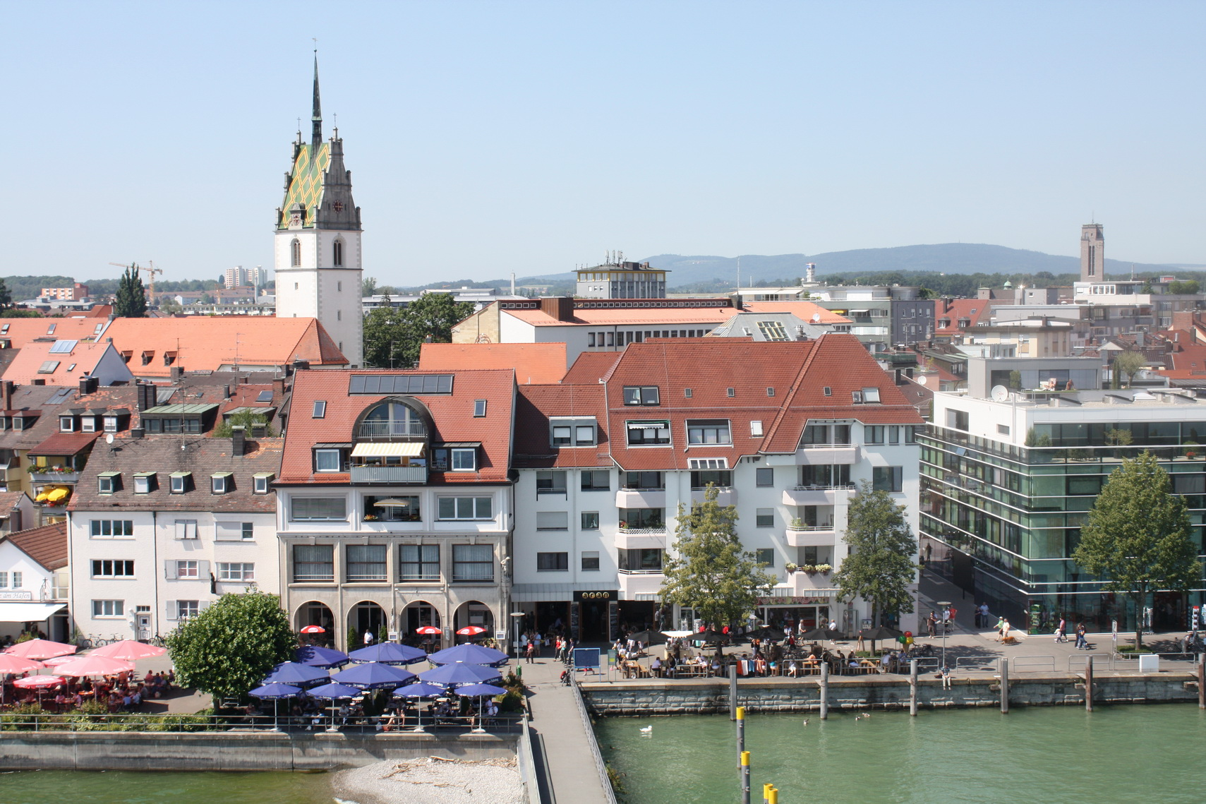 Blick vom Moleturm auf die Innenstadt von Friedrichshafen